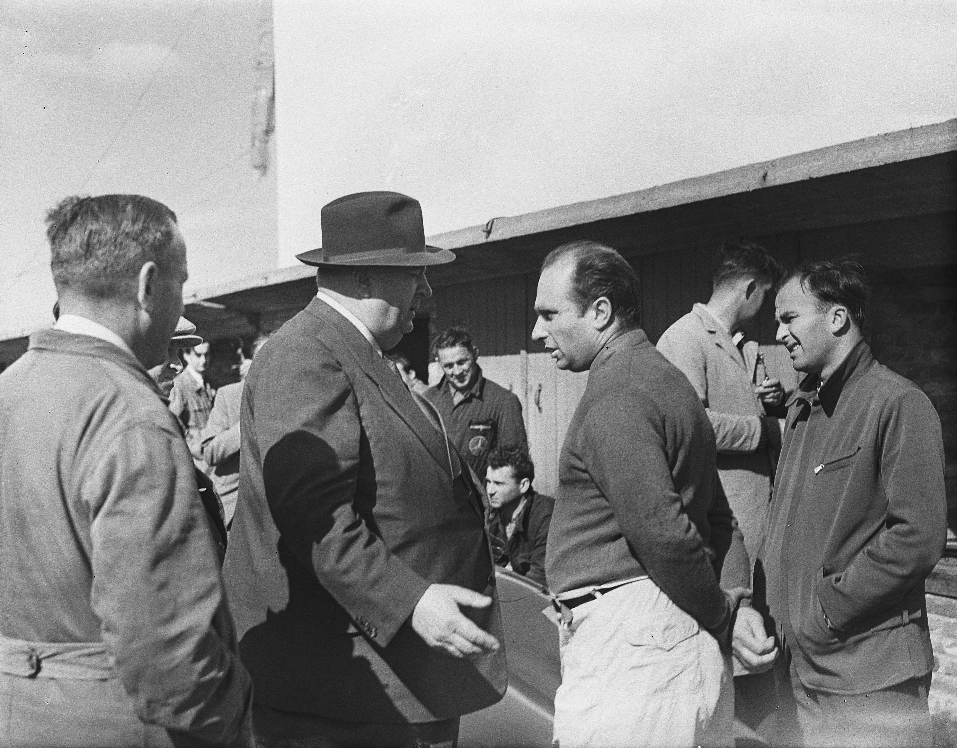 Training voor Grote Prijs van Nederland op Zandvoort, leider van de Mercedesploeg Alfred Neubauer (met hoed) in gesprek met Juan-Manuel Fangio